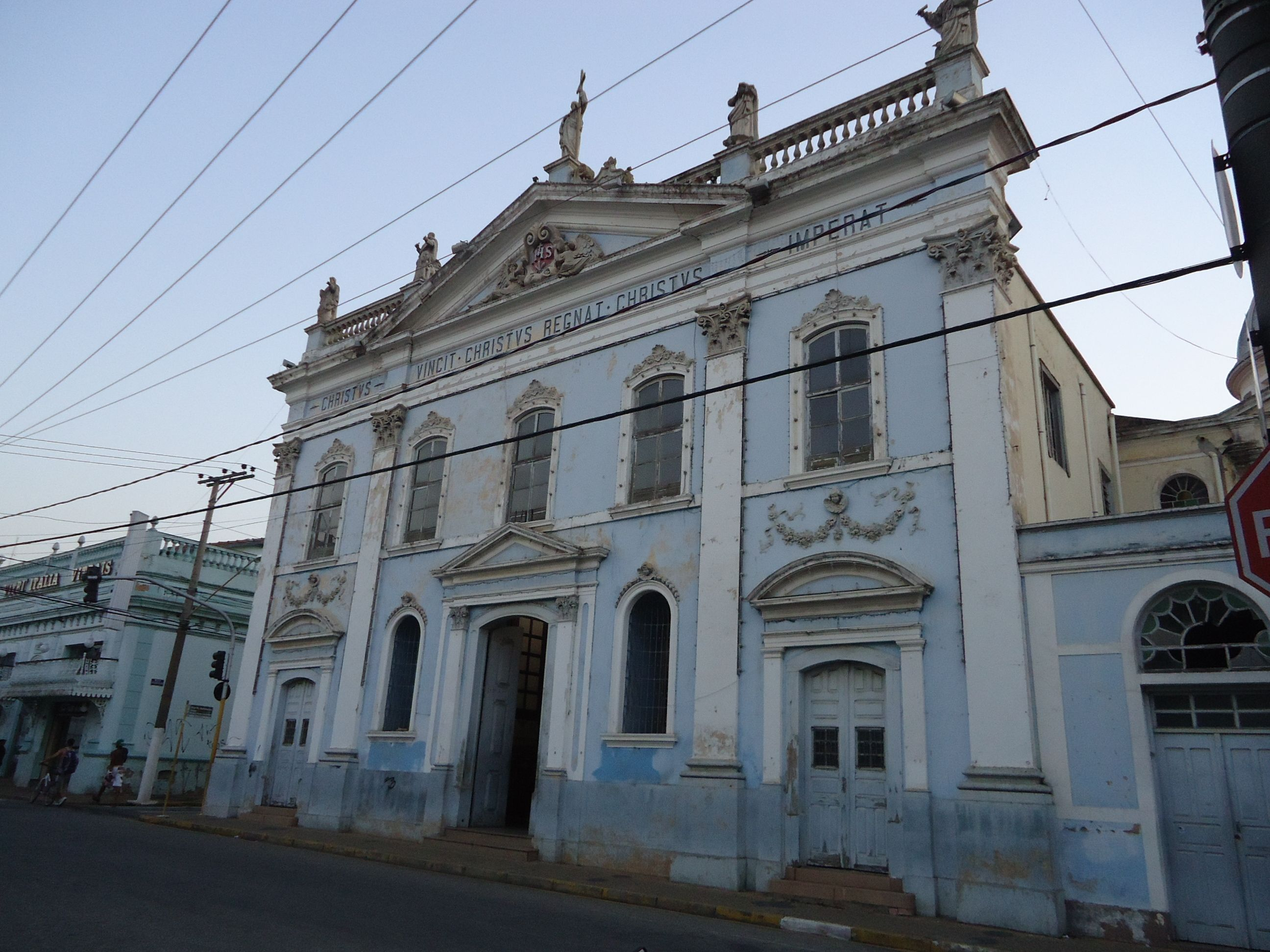 Imagem da fachada da igreja Nosso Senhor Bom Jesus, autor próprio